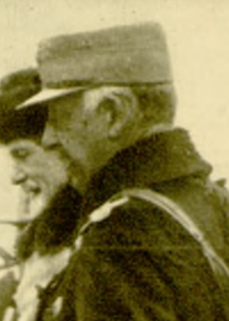 Generalul Arion Brown (sau Arion Broon), comandantul Brigăzii 4 Călăraşi Restricţii - fără restricţii datorită vechimii